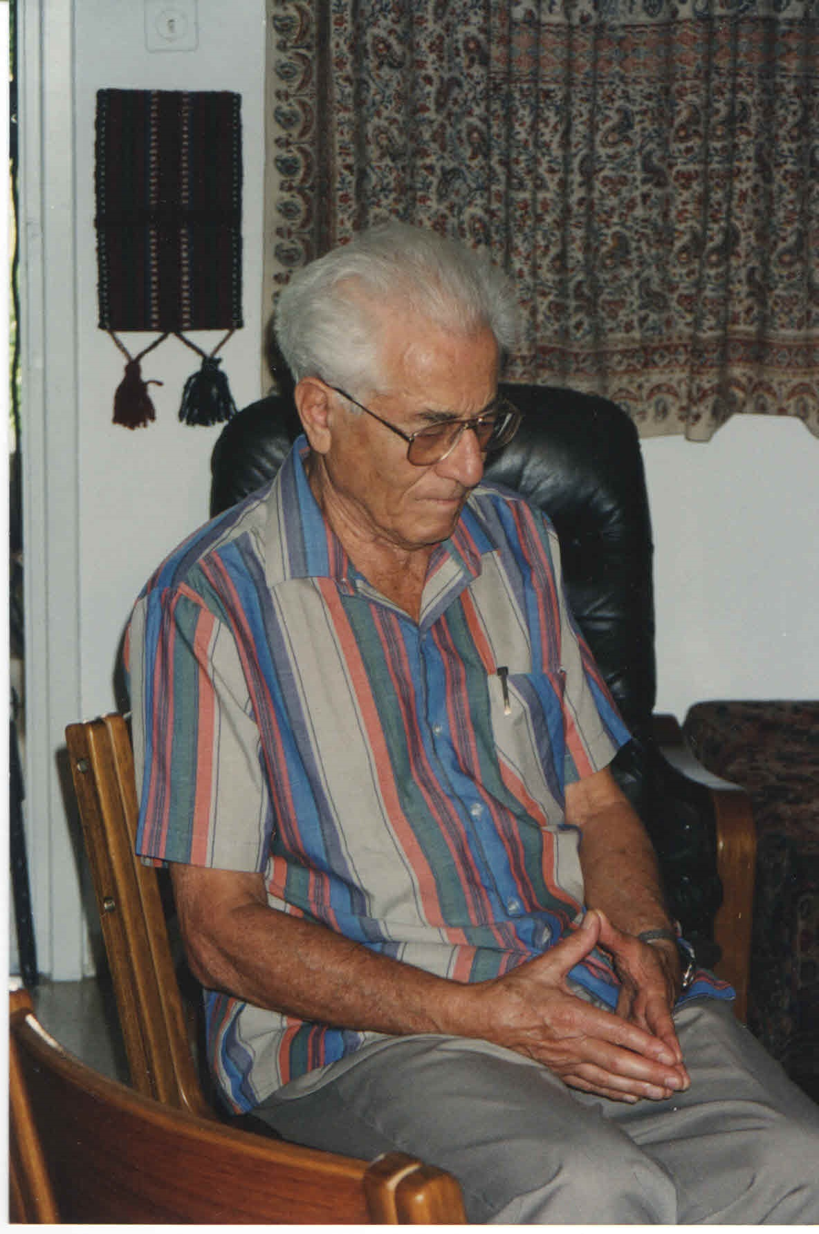 כוונות טובות